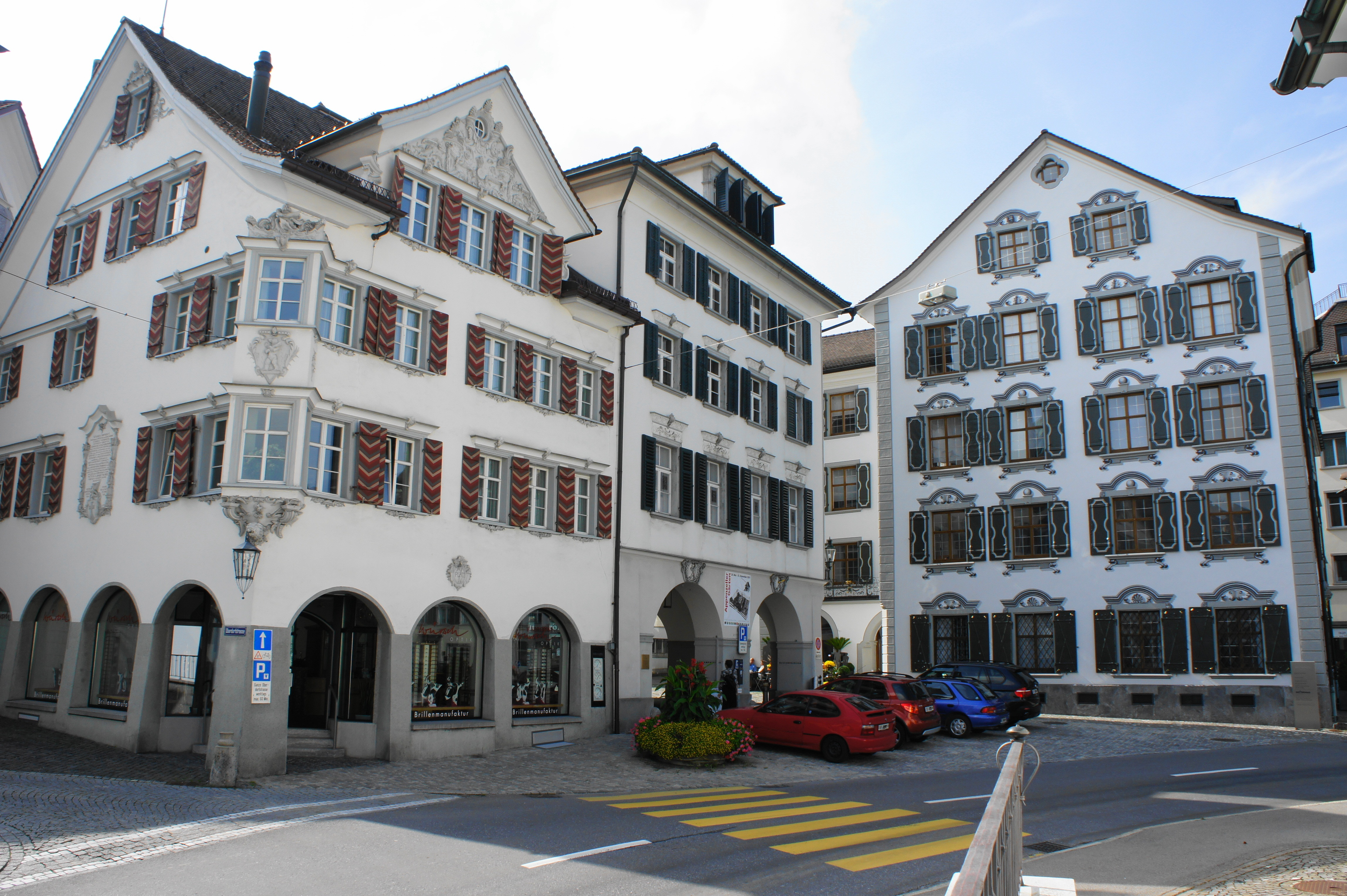 Historisches Museum (mittleres Gebäude), links ist ein Haus angebaut, rechts vom Museum (mit kleinem Abstand) das Wetterhaus, im Vordergrund die Hauptstrasse, Blick auf die Häuser-Gruppe von der gegenüberliegenden ref. Kirche